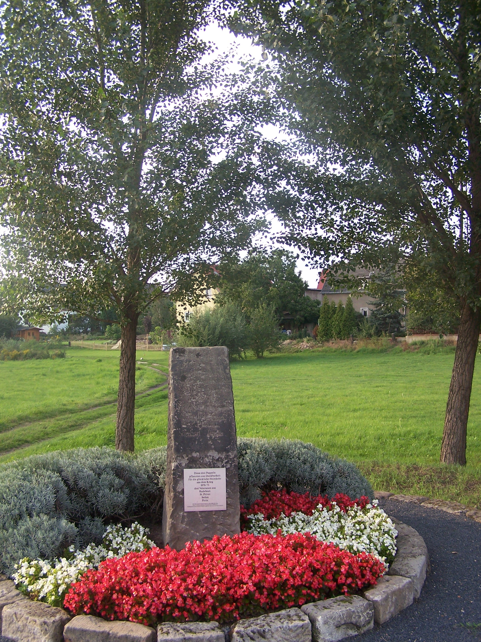 Heimkehrerstein/Dreimännerstein Radebeul, Deutschland. Inschrift: Diese drei Pappeln pflanzten aus Dankbarkeit für die glückliche Heimkehr aus dem Krieg 1870/71 drei Veteranen aus Radebeul. St. Privat Sedan Paris.